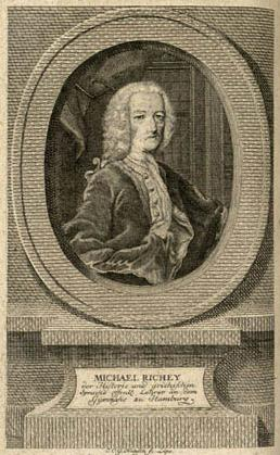 Der Hamburgische Gelehrte Michael Richey (1678-1761) auf einem Portraitkupferstich aus "Zuverläßige Nachrichten von dem gegenwärtigen Zustande der Wissenschaften"